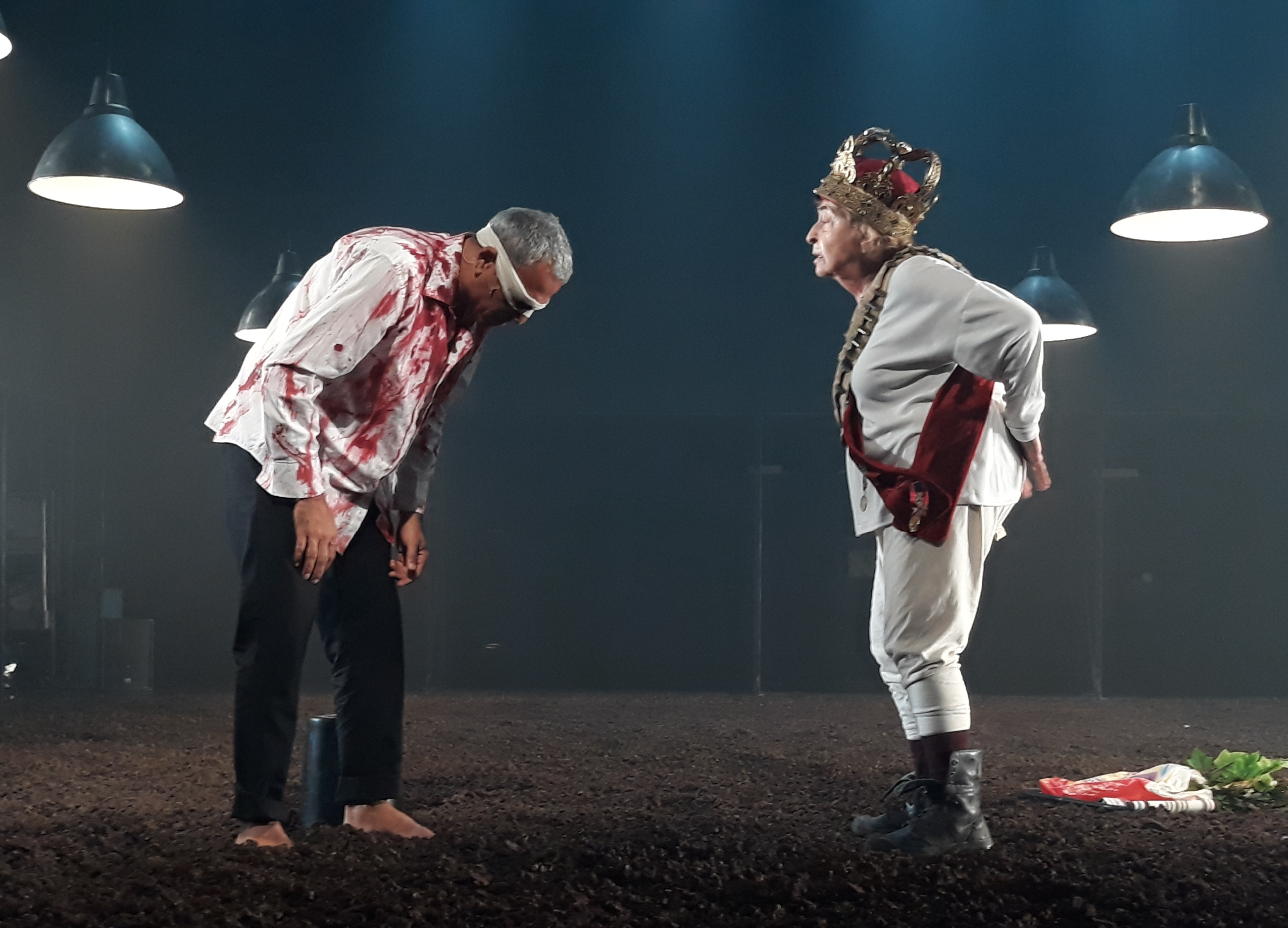 המלך ליר - תיאטרון הבימה 2018 מאת: וויליאם שייקספיר בימוי: גדי רול